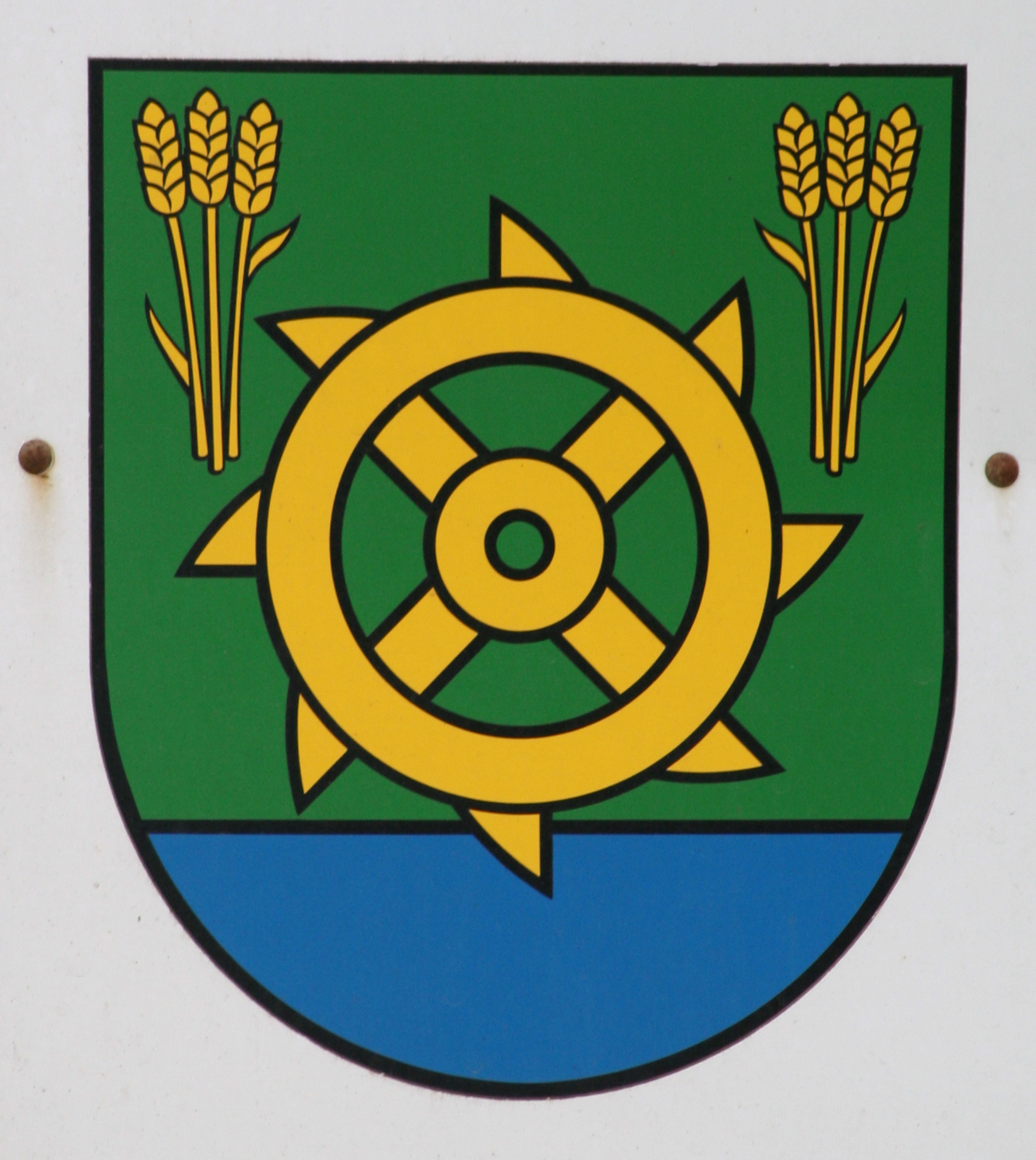 Erb obce Soboš